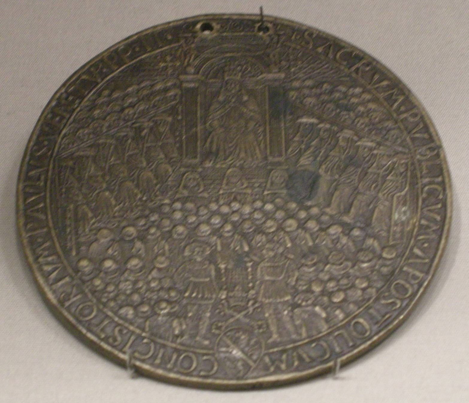 Emilio orfini da foligno e andrea di niccolò da Viterbo, medaglia del concistoro di papa paolo II, 1466-1467